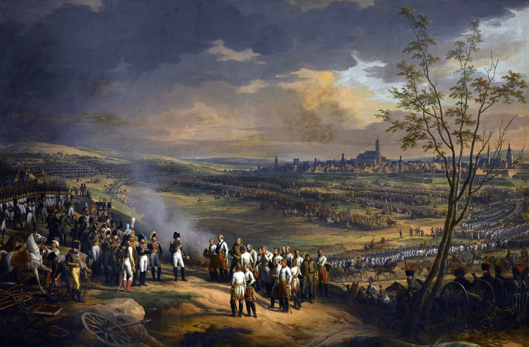 Reddition de la ville d’Ulm, le 20 octobre 1805, Napoléon Ier recevant la capitulation du général Mack.title QS:P1476,fr:"Reddition de la ville d’Ulm, le 20 octobre 1805, Napoléon Ier recevant la capitulation du général Mack." label QS:Lfr,"Reddition de la ville d’Ulm, le 20 octobre 1805, Napoléon Ier recevant la capitulation du général Mack."